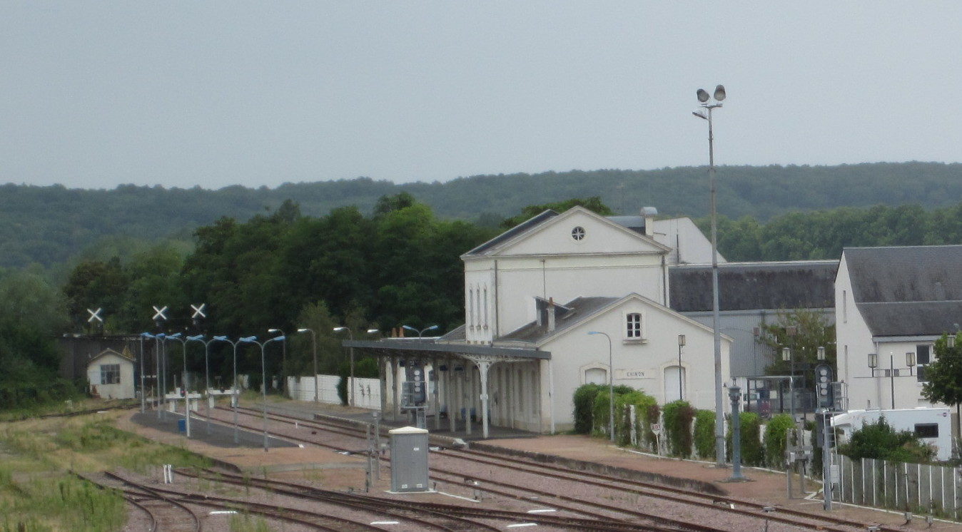 Gare ferroviaire de Chinon, Indre-et-Loire. Vue du bâtiment voyageur, de la marquise, du quai et des voies.